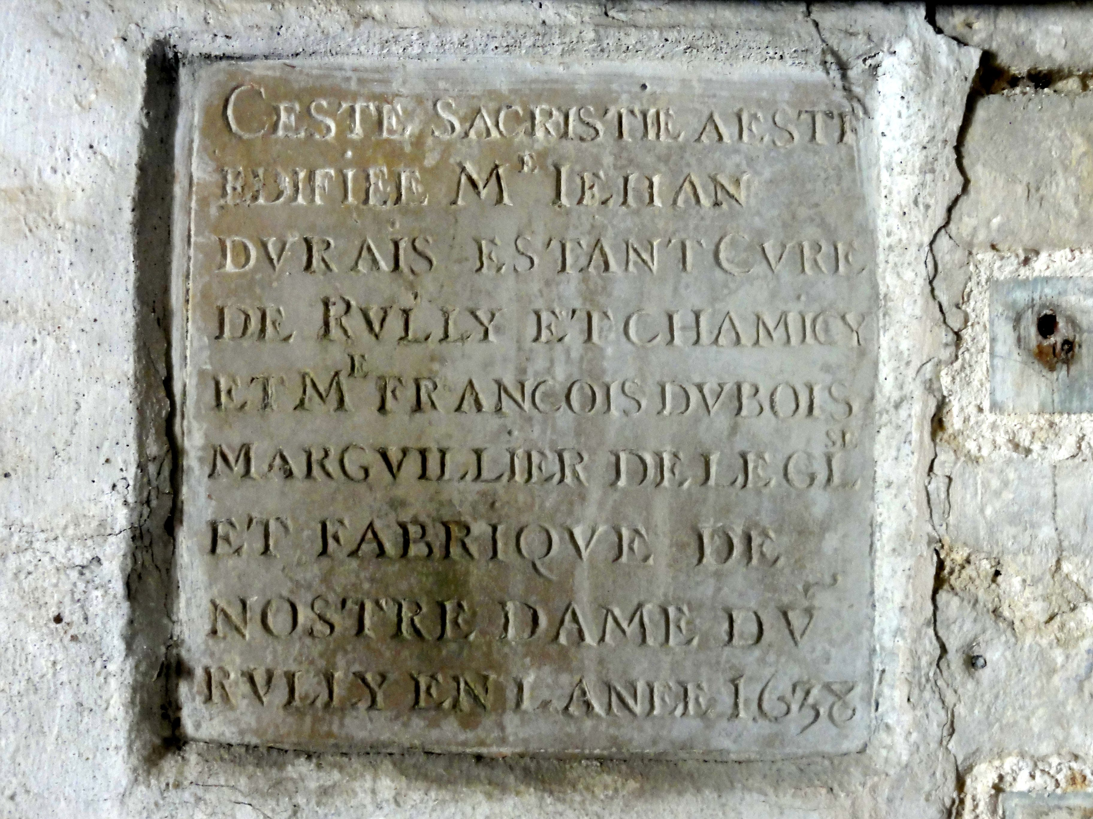 Inscription dans la sacristie.